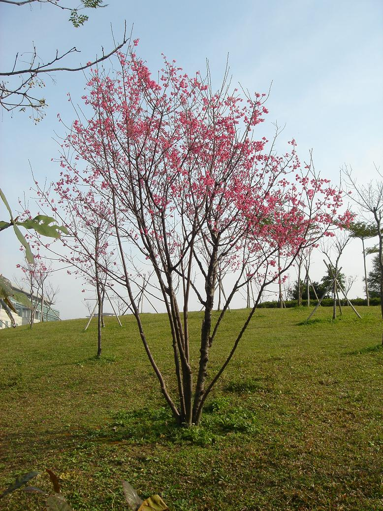 台北縣中和市四號公園小山上盛開的櫻花